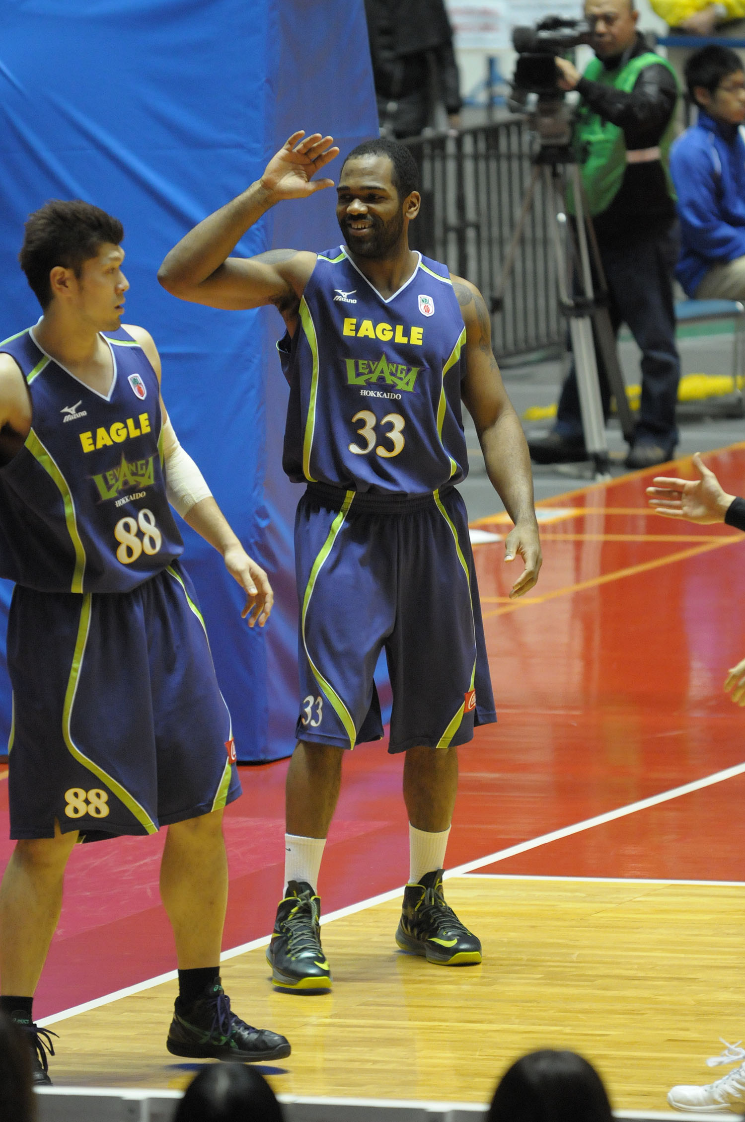 レバンガ北海道、ジェロウム・ティルマン選手。代々木第一体育館で。